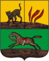 Şuşa qəzasının gerbi